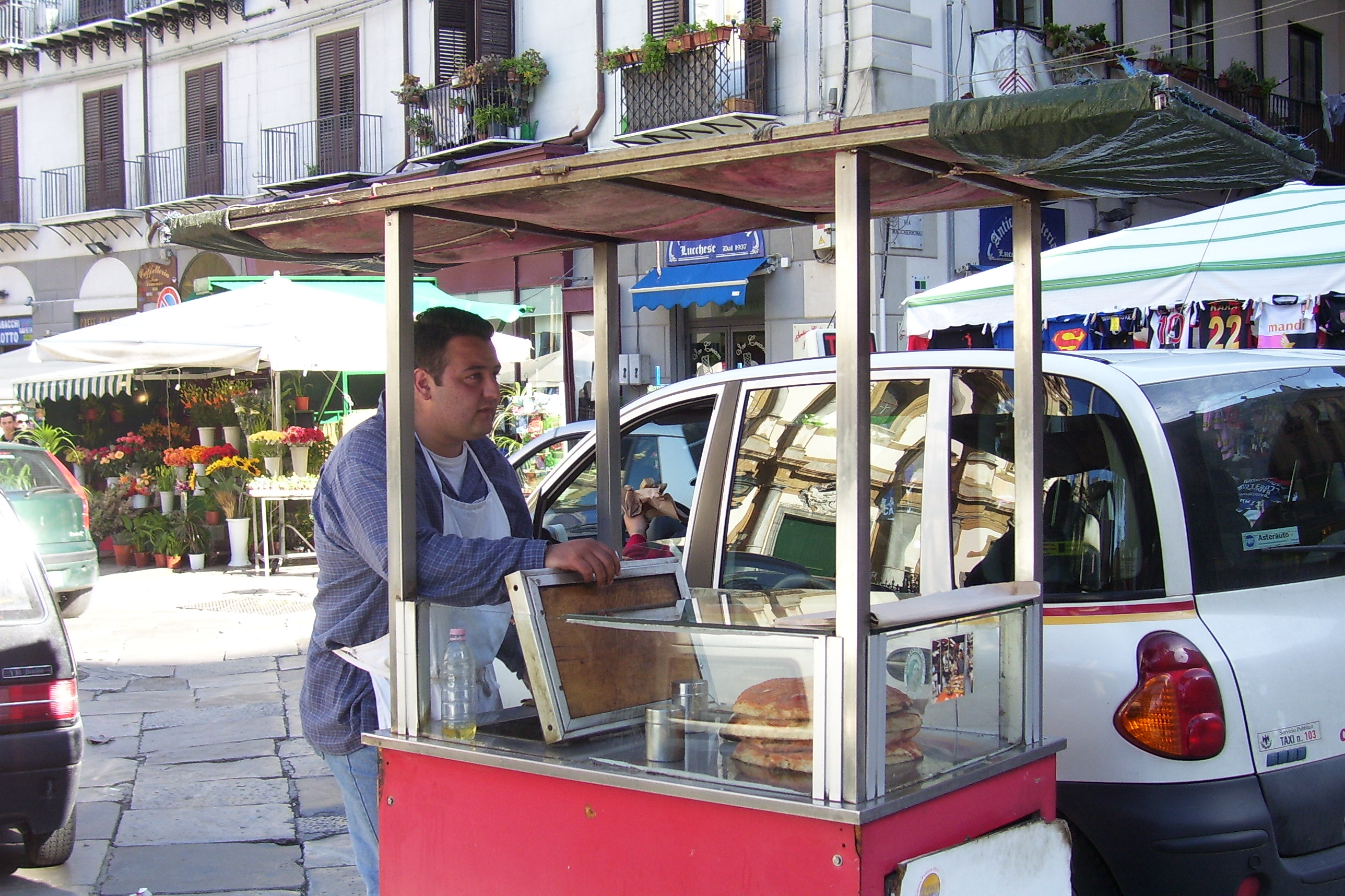 Palermo, sfincionaru (venditore di sfincione)